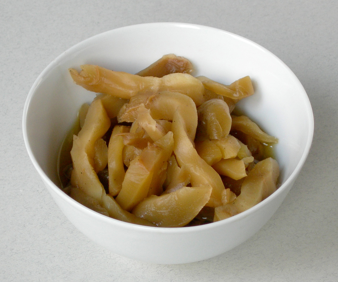 Chinese Tsa tsai, a pickled carrot of Brassica juncea (L.) var. tumida Tsen & Lee or B. juncea (L) var. tsatsai Mao.